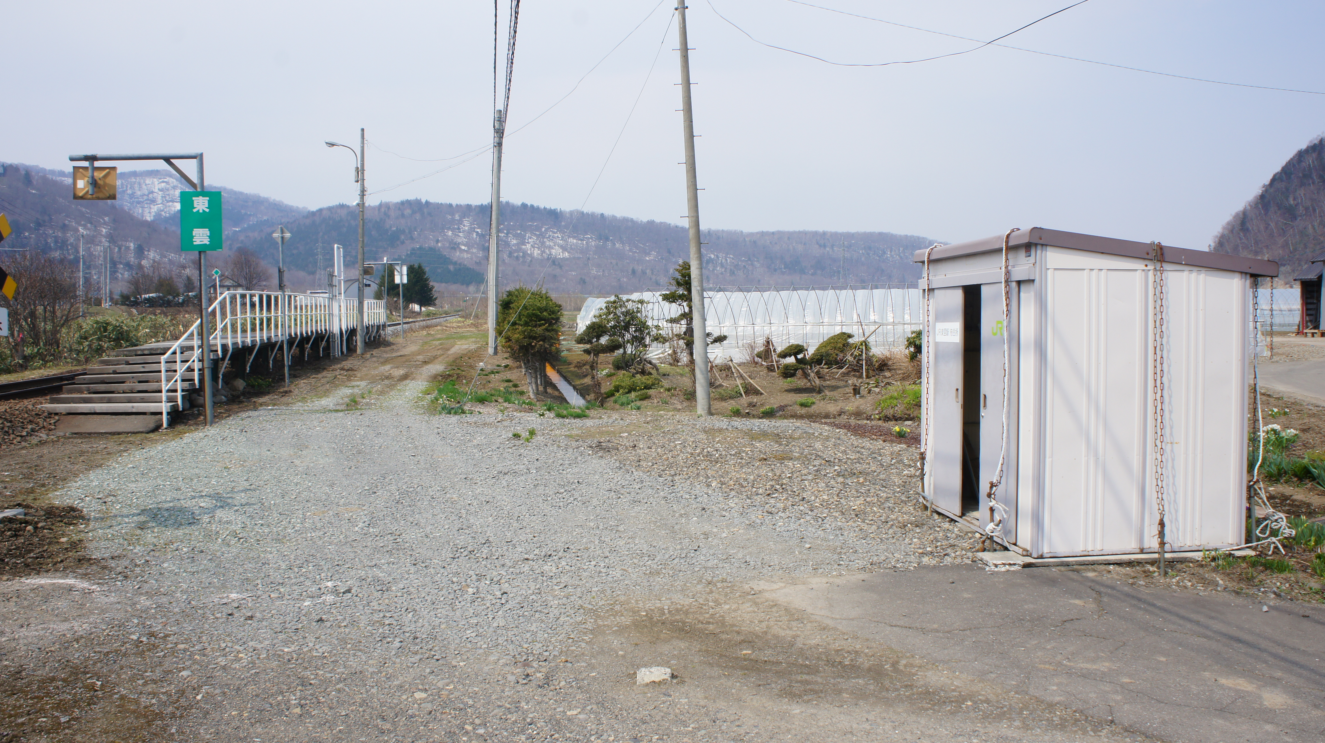 JR石北本線・東雲駅全体